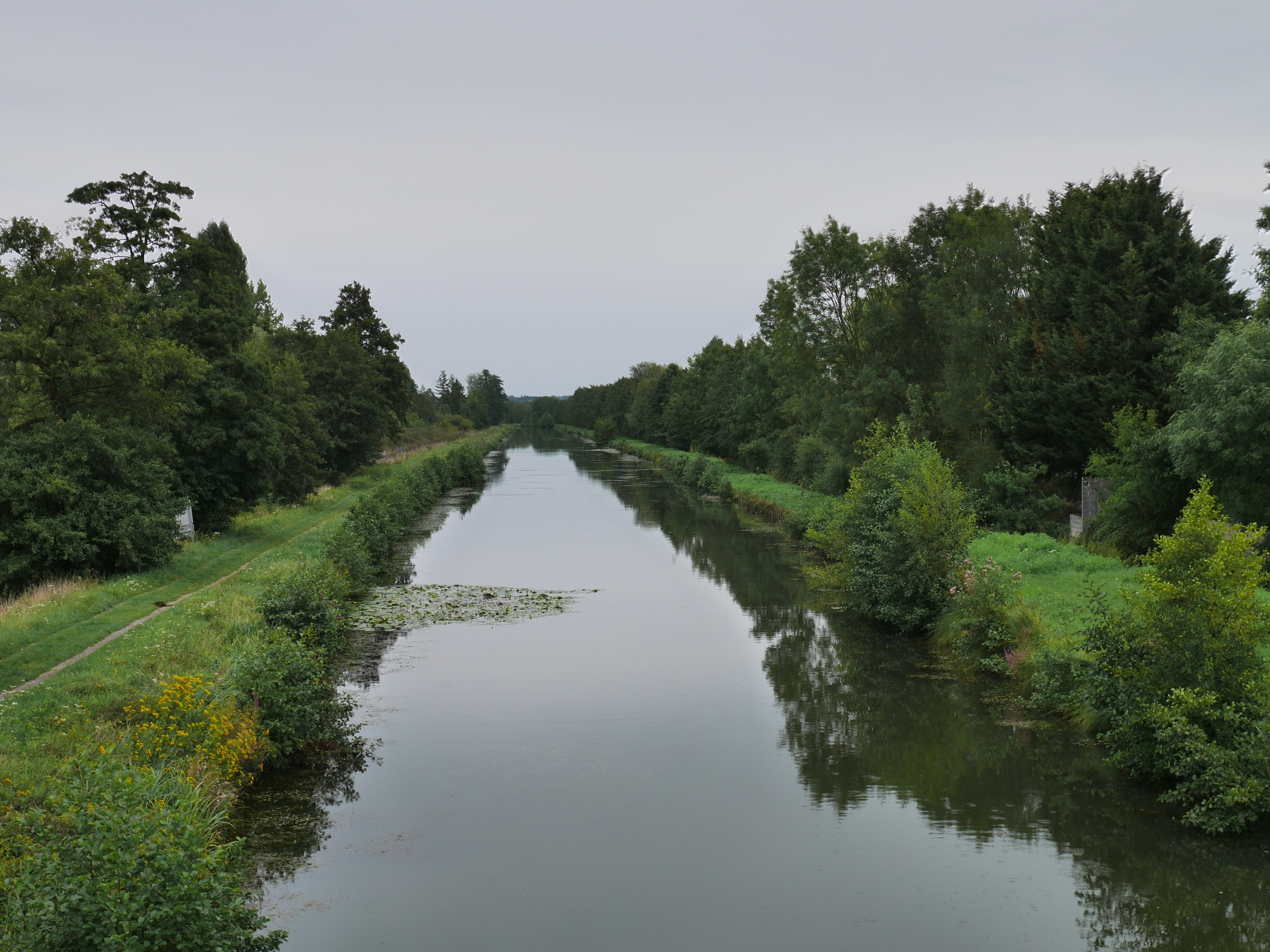 Canal de la Sambre à l'Oise à Ors (Nord, France)